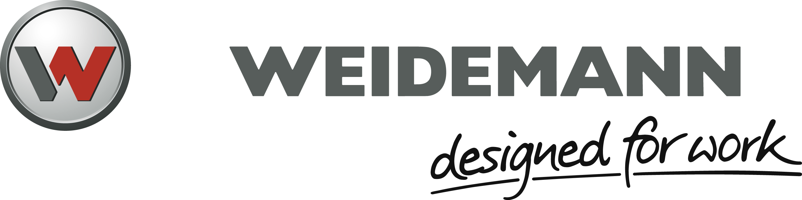 Logo mit Claim der Weidemann GmbH